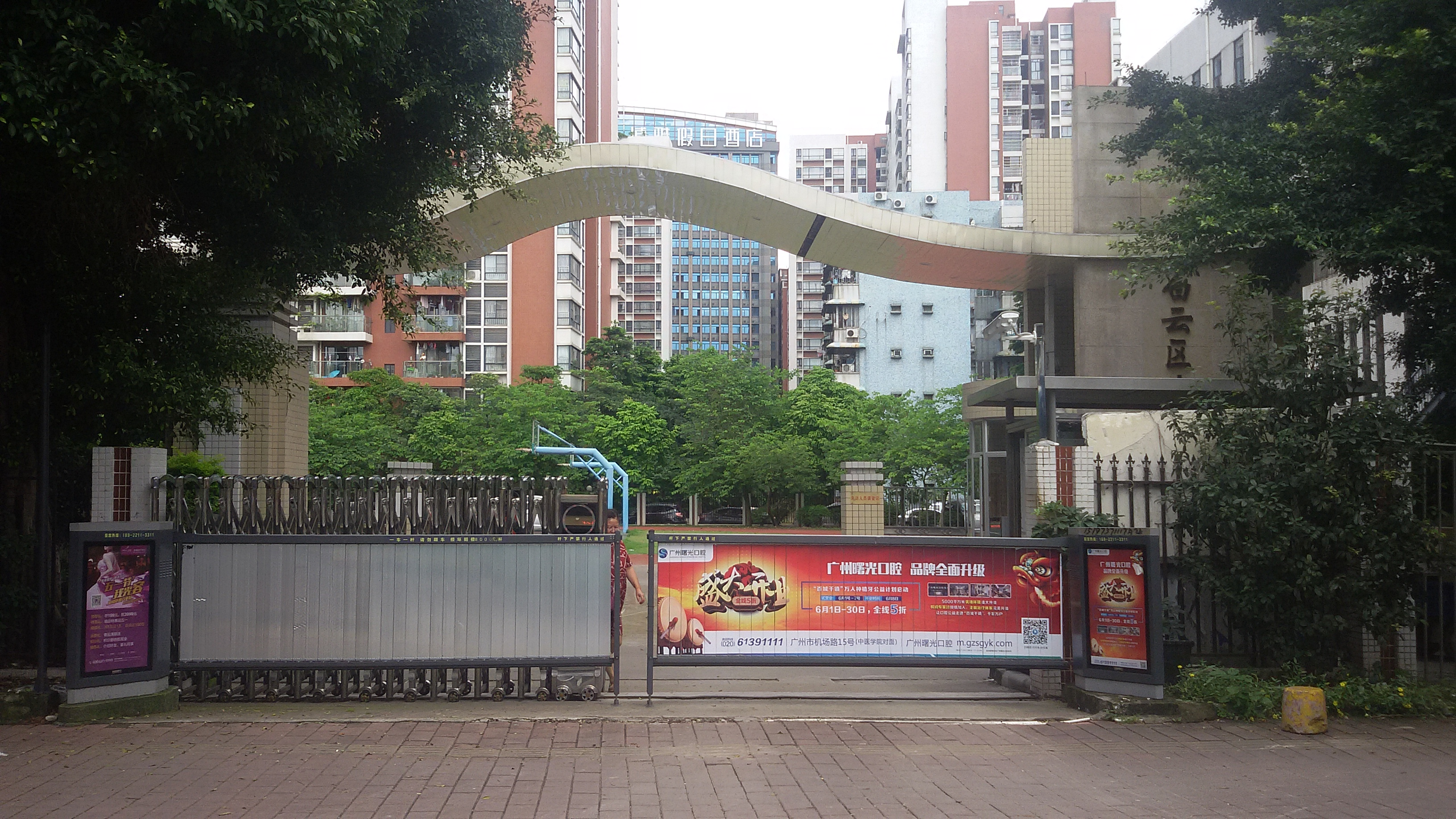 粵語: 白云区少年宫